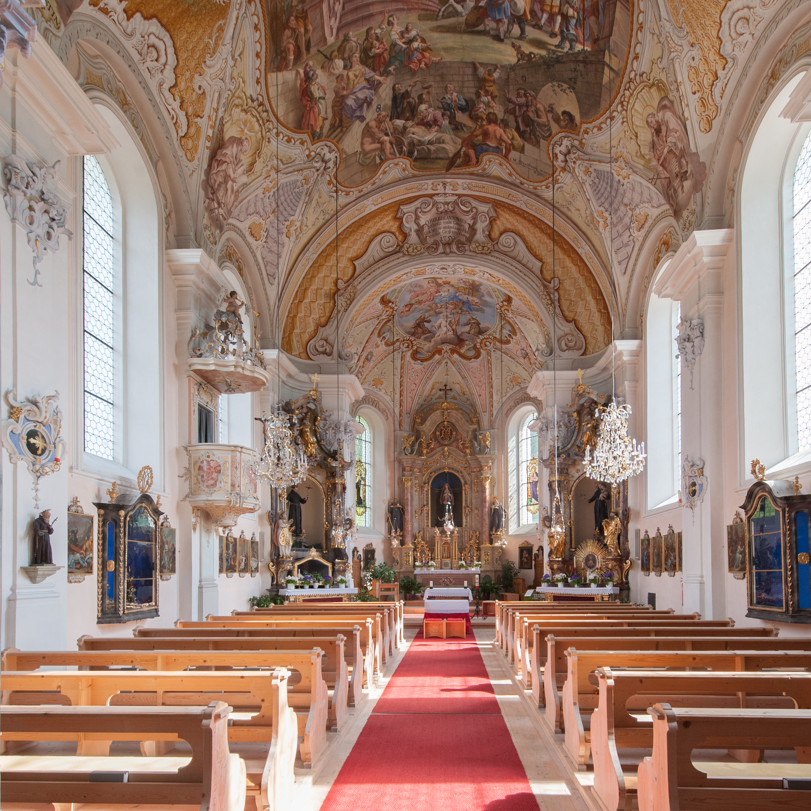 Wiki takes Nordtiroler Oberland: Wallfahrtskirche hl. Antonius von Padua Rietz